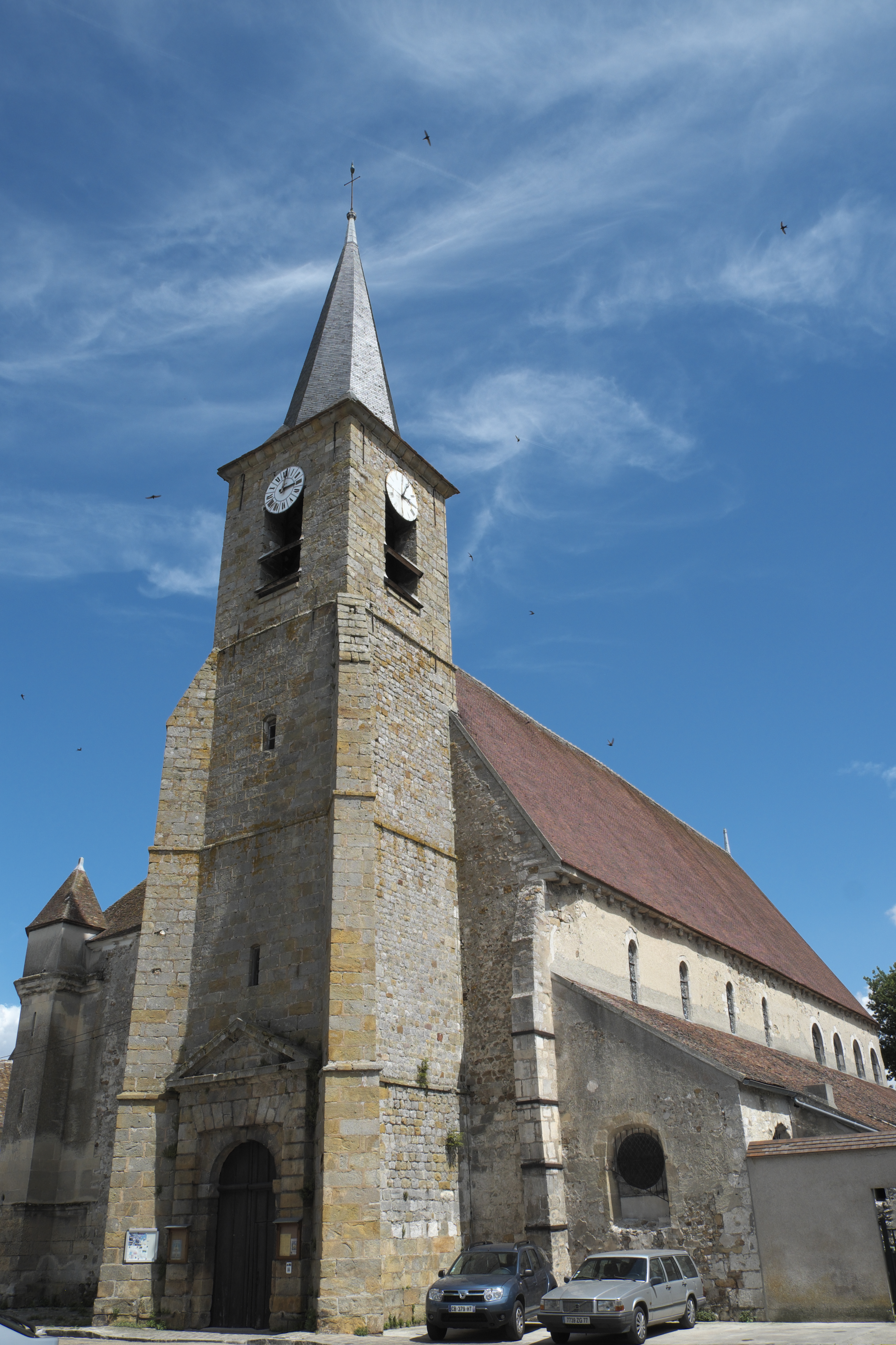 Katholische Pfarrkirche Sainte-Croix (früher Kollegiatskirche Notre-Dame) in Bray-sur-Seine im Département Seine-et-Marne (Île-de-France/Frankreich), Glockenturm